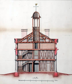 La Nouvelle Orléans, Cutaway view of the first Ursuline convent, (detail), 1733, Ignace François Broutin